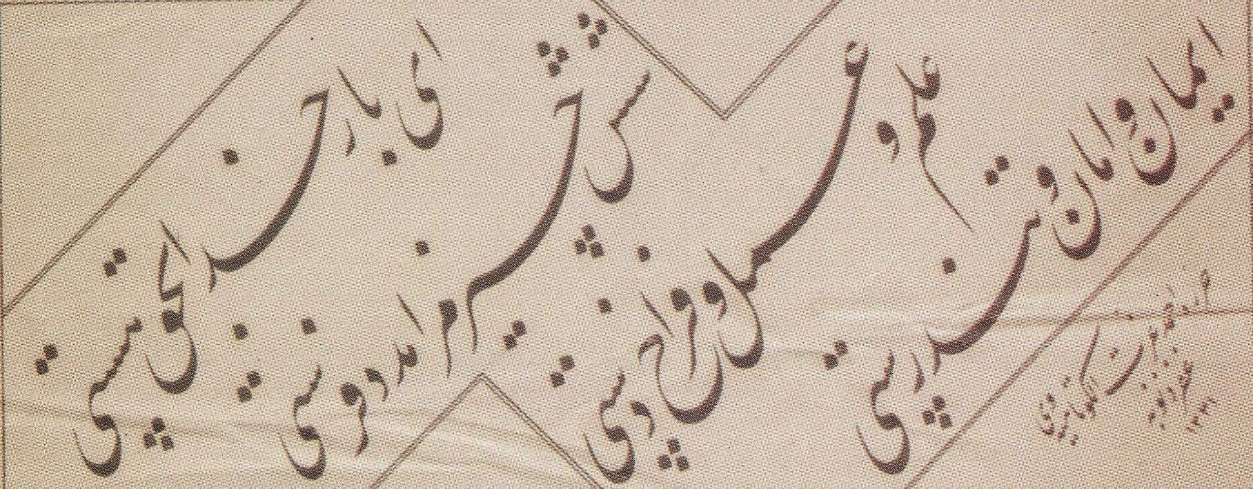 ahmed izzet yeşil hat